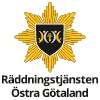 Räddningstjänsten Östra Götalands logotyp